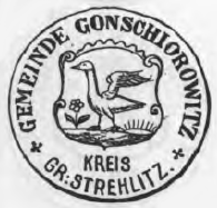 Altes Siegel des Ortes Gonschiorowitz im Kreis Groß Strehlitz, Schlesien.